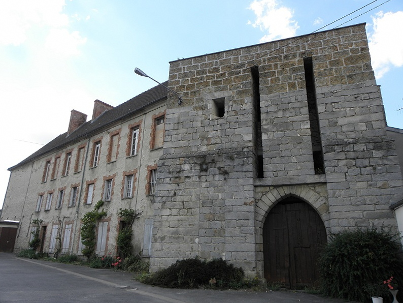 Château de Troissy (51).